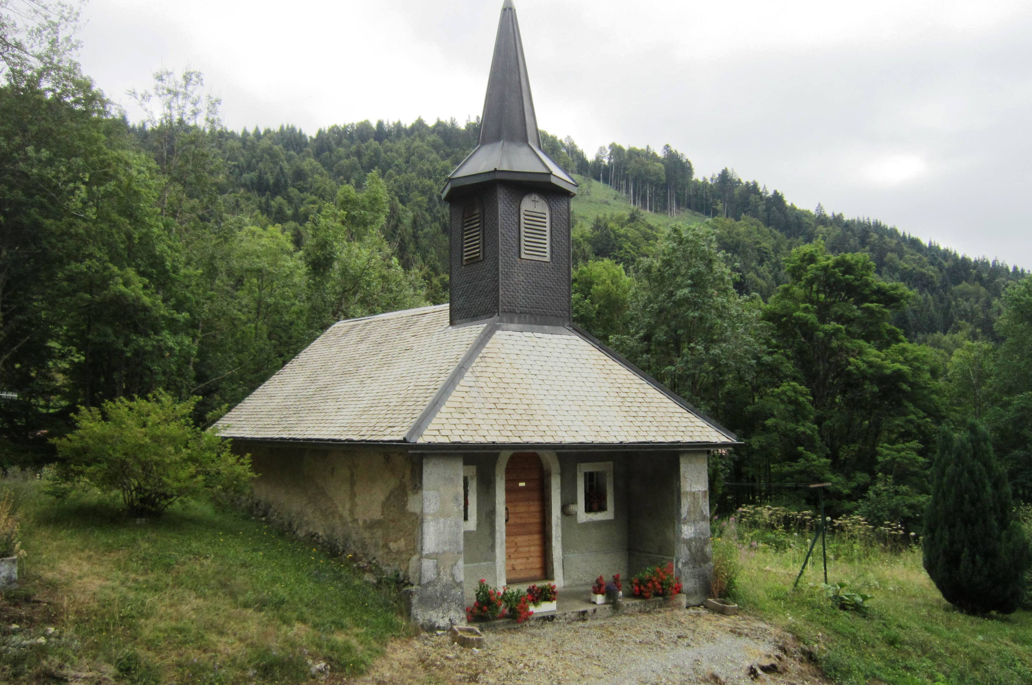 Chapelle des Arces à Habère-Poche (Haute-Savoie)